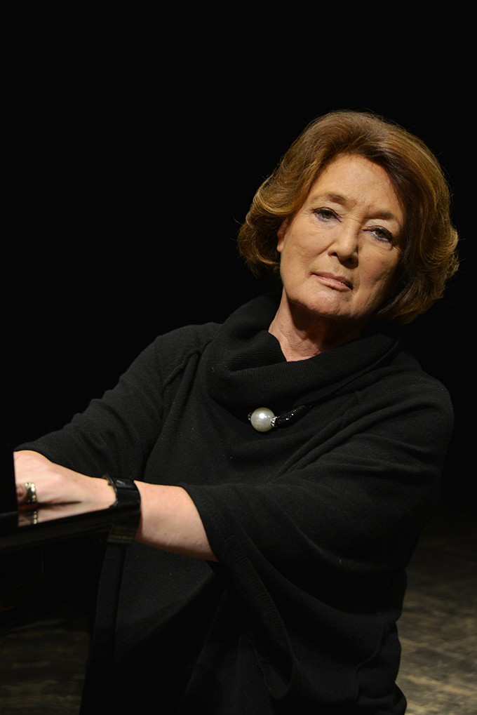 Ritratto di Edda Moser (soprano tedesco e docente universitaria) - Teatro Nuovo - Spoleto 2016